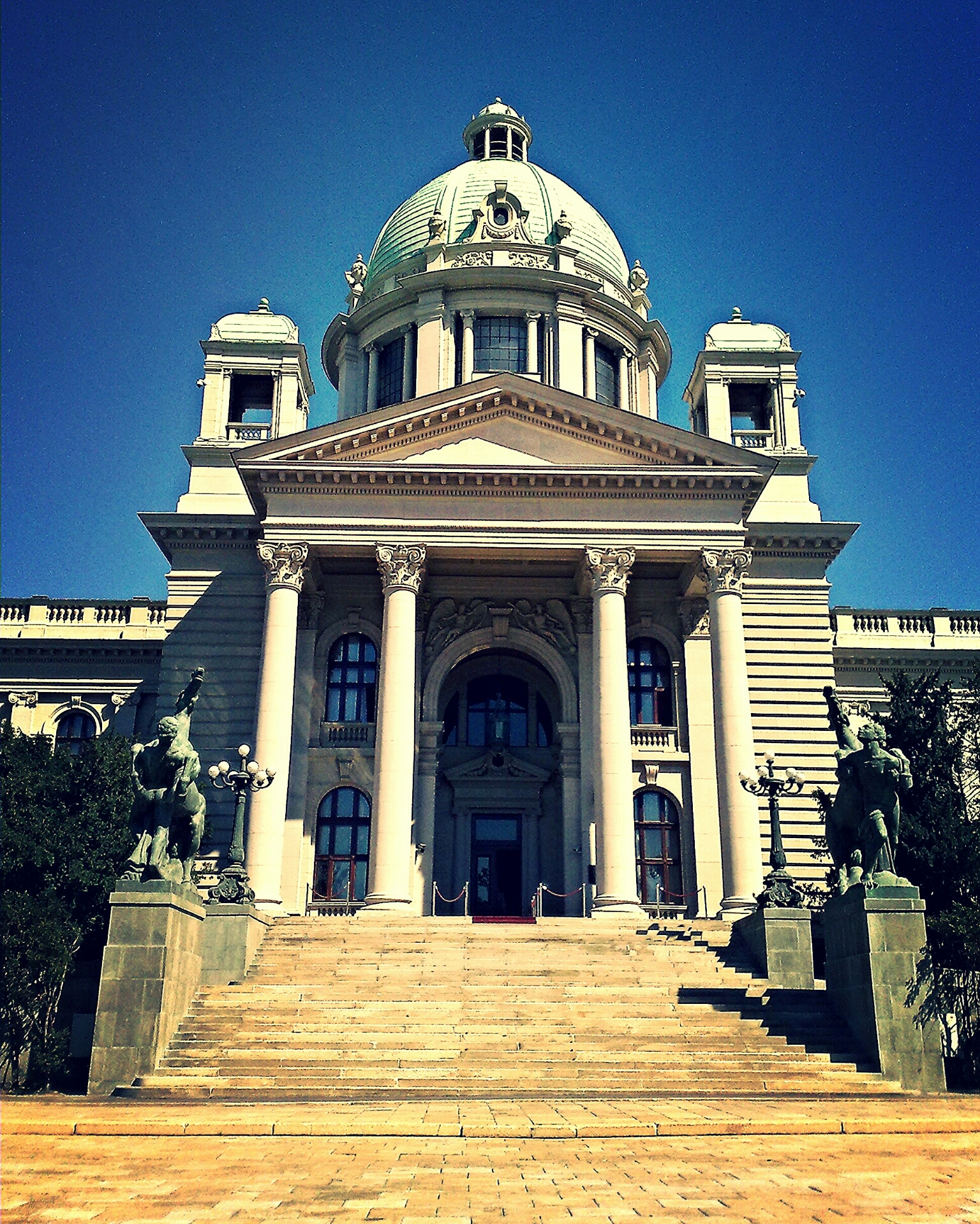 Зграда Народне скупштине